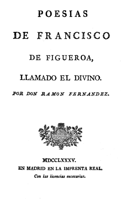 Portada del libro "Poesías de Francisco de Figueroa, llamado El Divino". Publicado en Madrid por Ramón Fernández, en 1785.